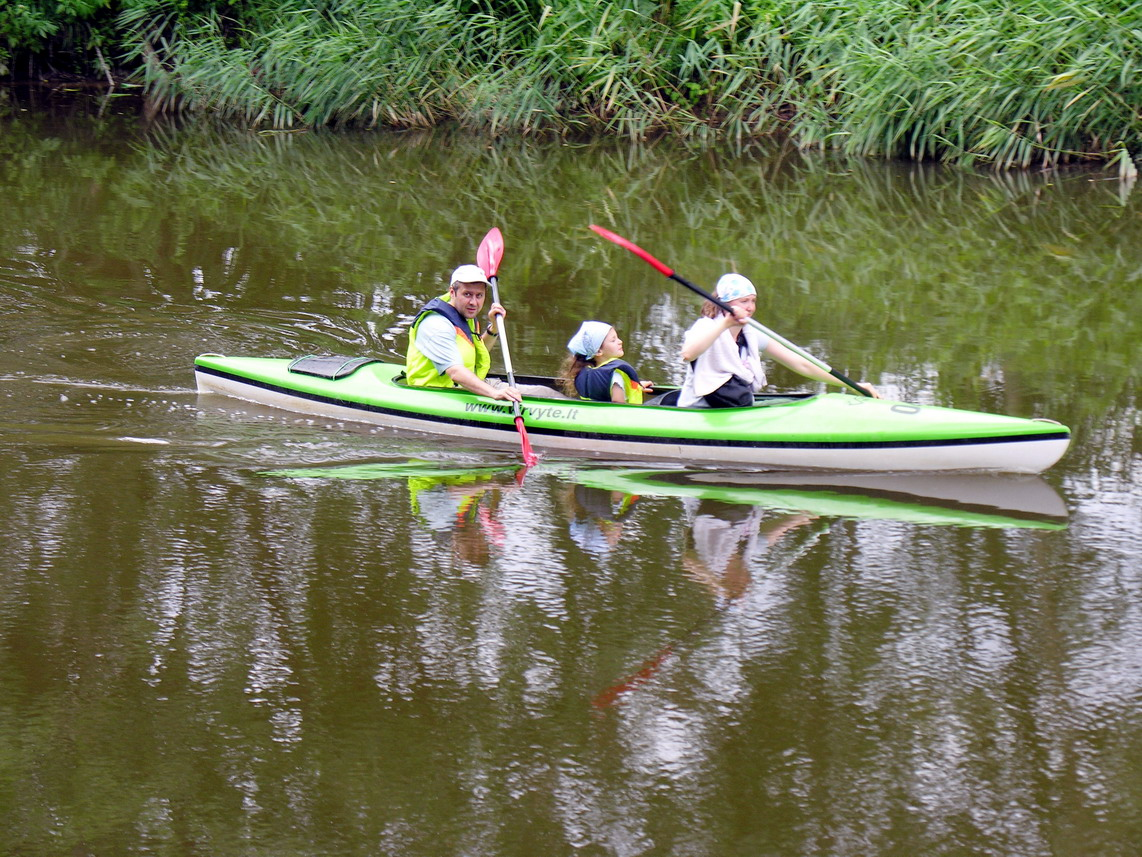 Baidarė siaura lengva mažos grimzlės valtelė uždaru viršumi be įkabų irklams. Foto: Algirdas, 2006 m. liepos 18 d., Lietuva